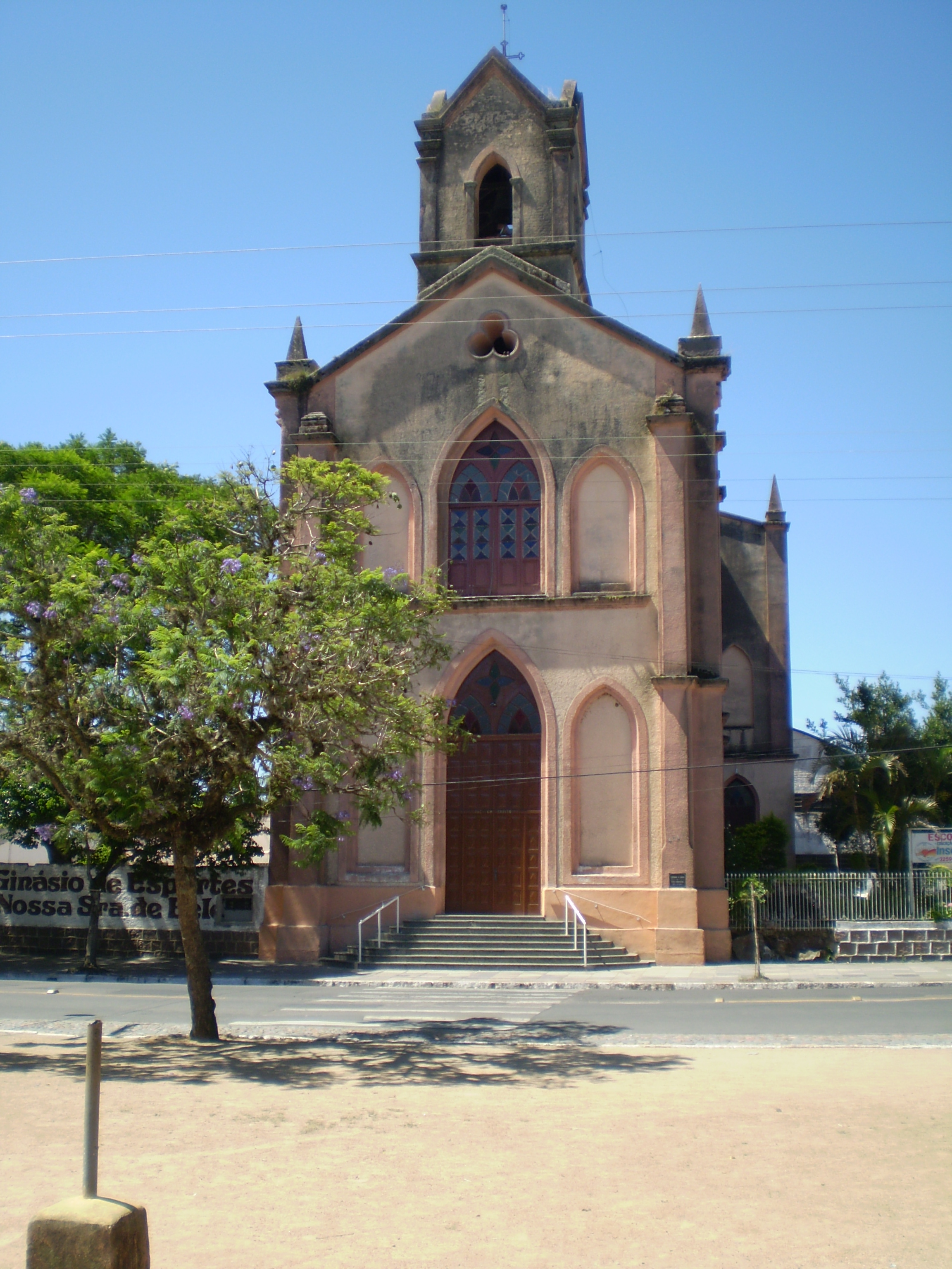 Church Nossa Senora de Belém.